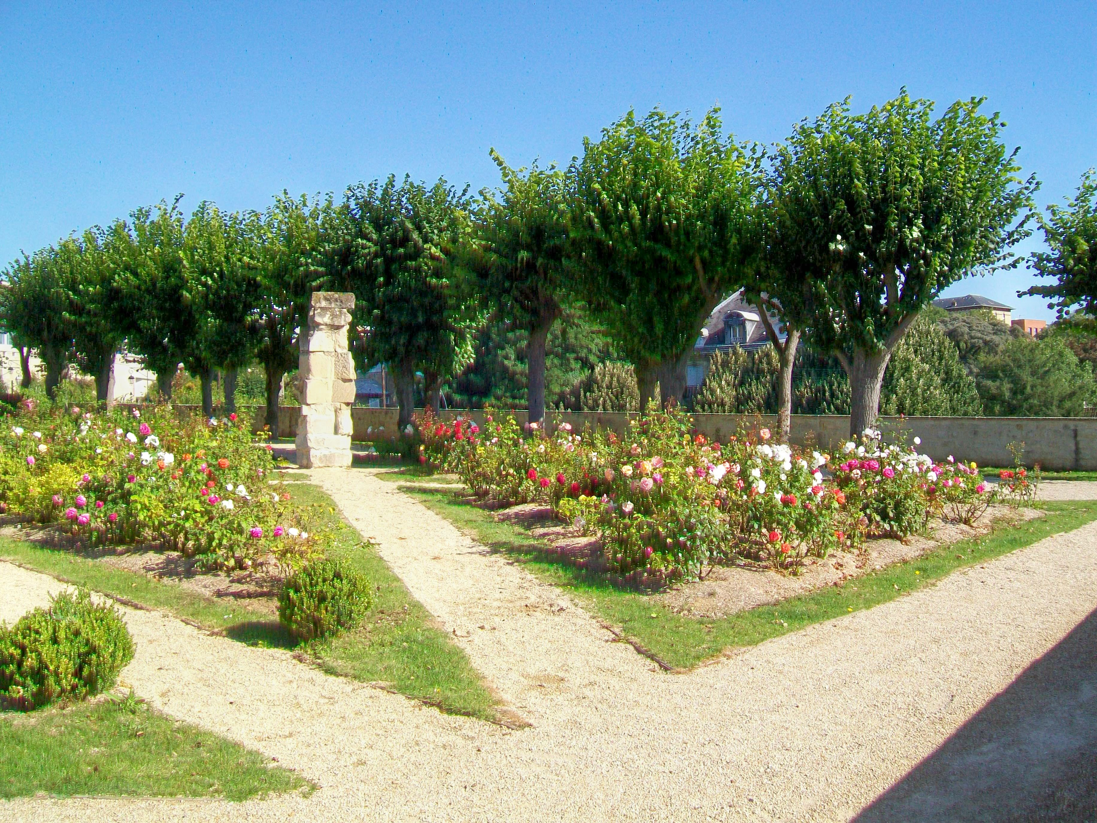 La roseraie dans le jardin de l'Hôtel de ville, dominant le rempart nord.